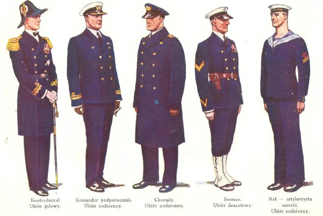 1935 marynarze II RP